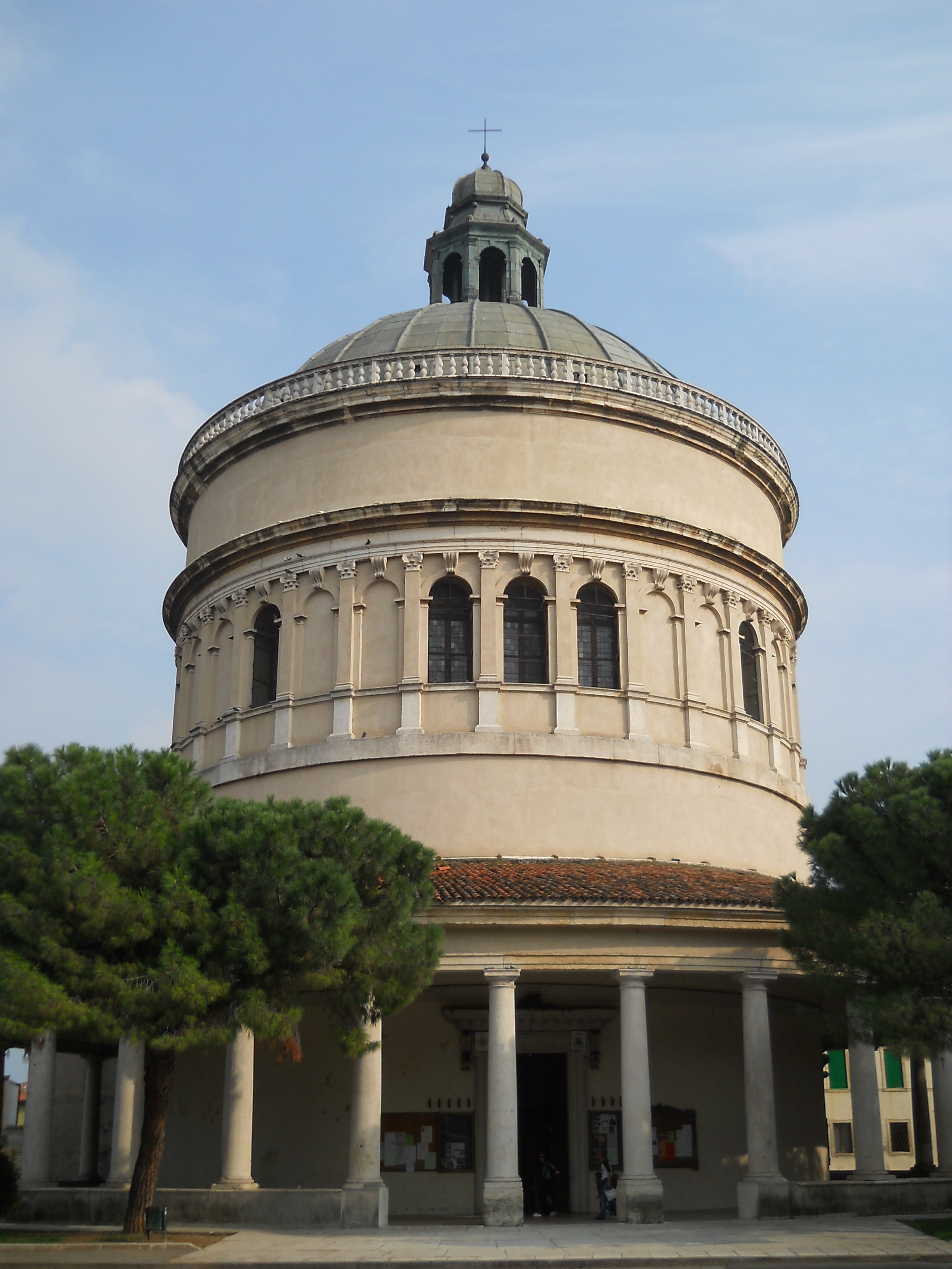 Chiesa di Madonna di Campagna. San Michele Extra, Verona. Progetto di Michele Sanmicheli